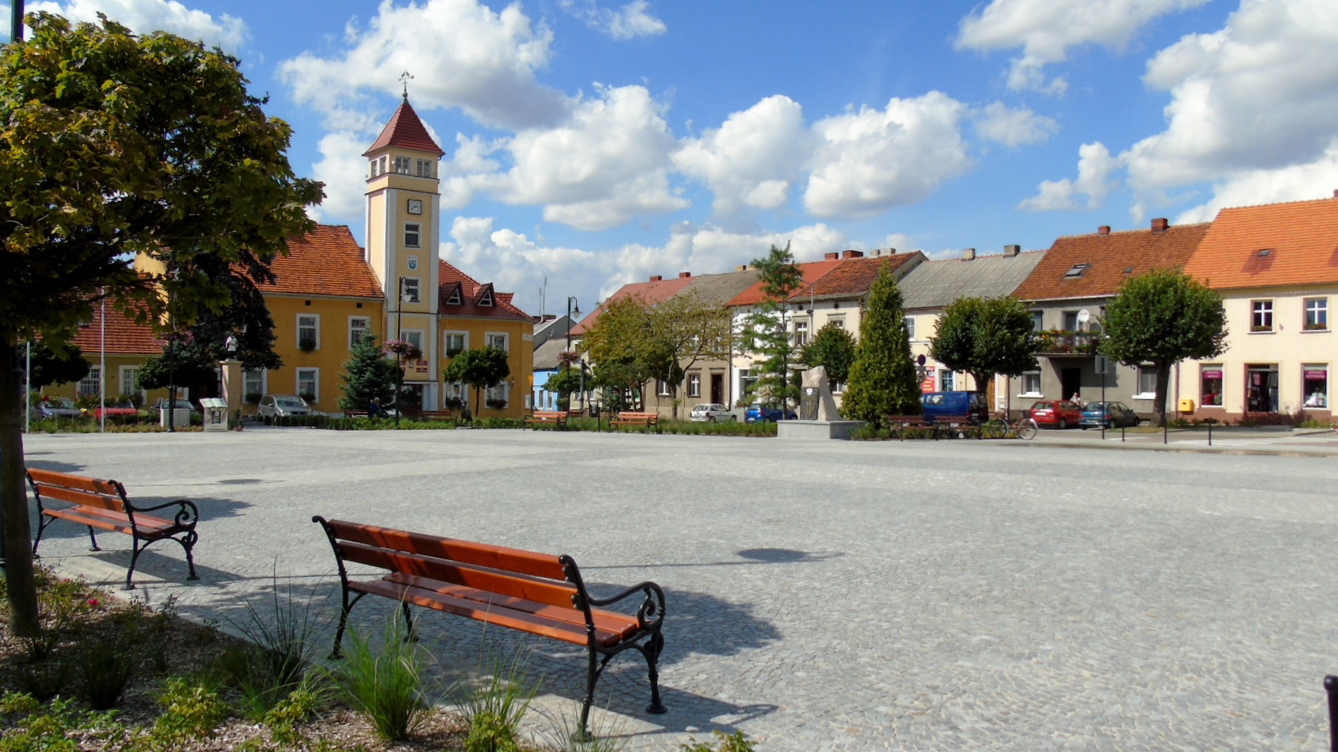 Dolsk, założenie urbanistyczne, 1396